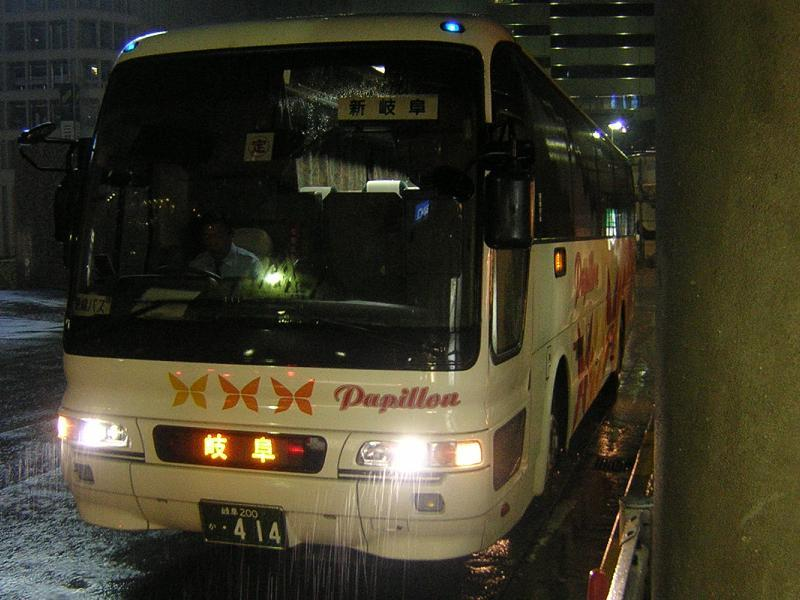 登録番号 岐阜200か・414 岐阜乗合自動車所属 ハピヨン号用 2005年8月13日 新宿駅西口にて撮影